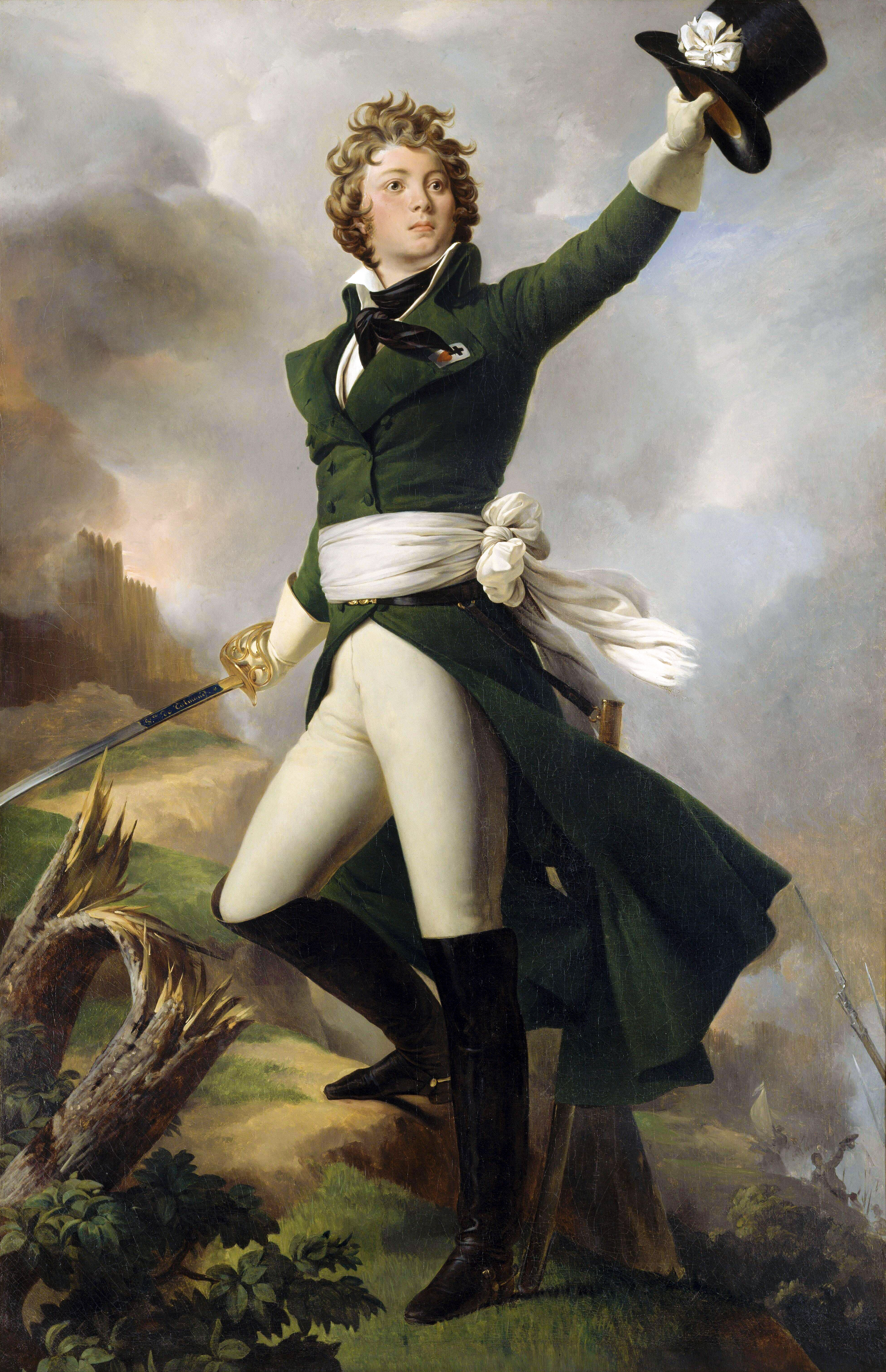 Antoine-Philippe de La Trémoille, prince de Talmont (27 septembre 1765, Paris - 27 janvier 1794, Laval)